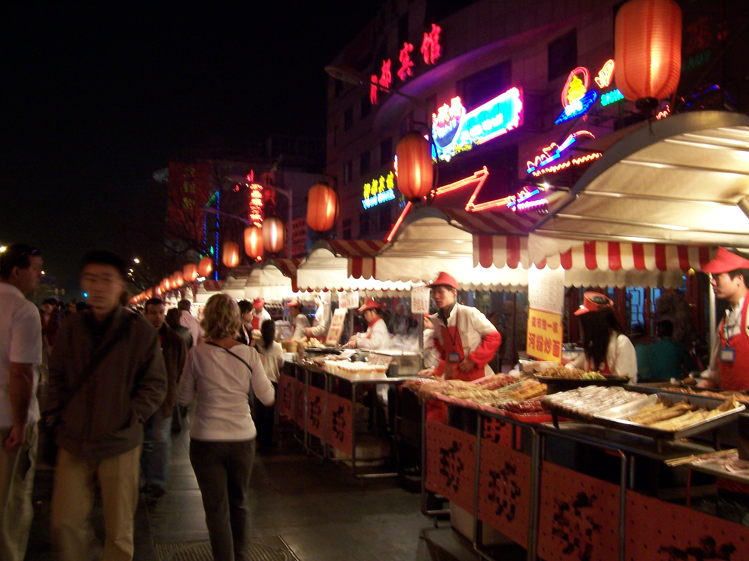 China - Beijing 4 - Night Market